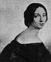 Amalia Bettini (1809-1894), attrice italiana